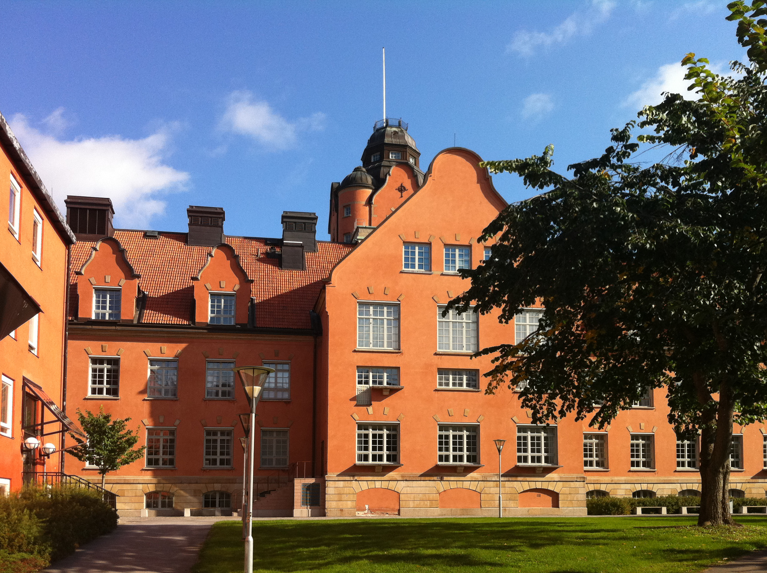 Fysicum, Uppsala universitet